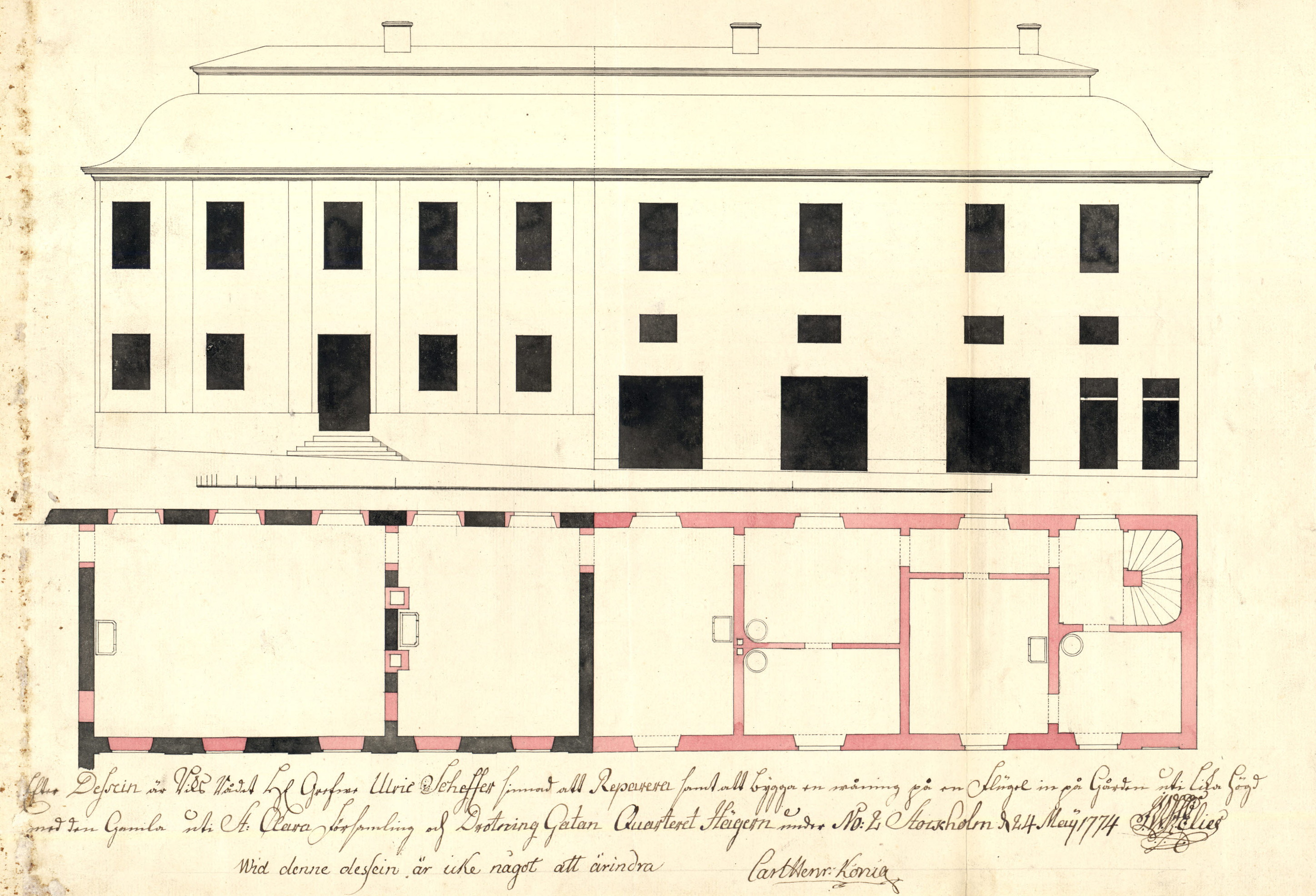 Nybyggnad för riksrådet, greve Ulrik Scheffer i Hägern större (Klara Östra kyrkogata)